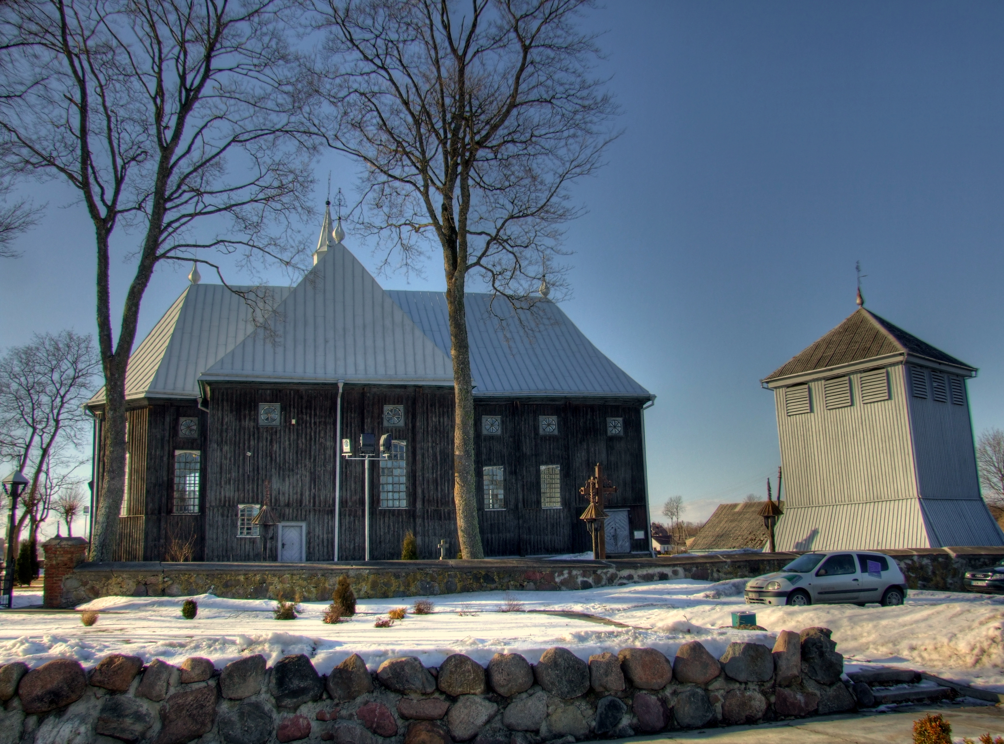 Seda church